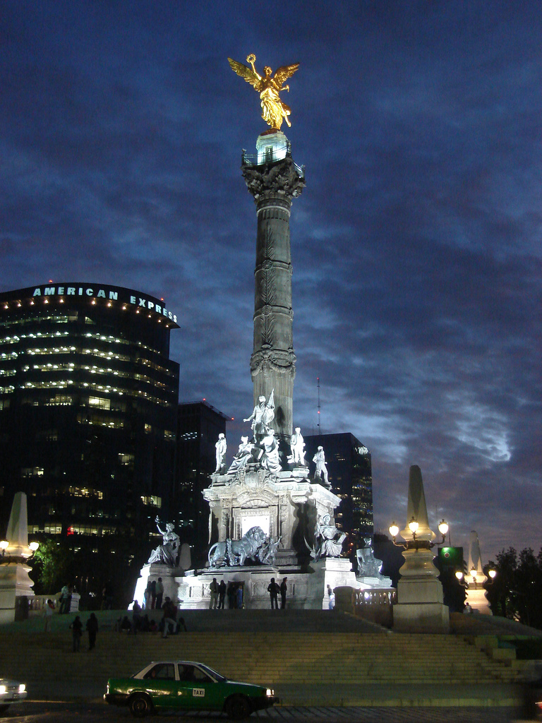 El Monumento a la Independencia, conocido popular y erróneamente como El Ángel es un monumento que se encuentra en la Ciudad de México, en la glorieta localizada en la confluencia de Paseo de la Reforma, Río Tiber y Florencia.